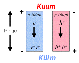 Seebecki efektist tingitud laengukandjate liikumine ning elektripinge P- ja N-tüüpi pooljuhtide otstel.